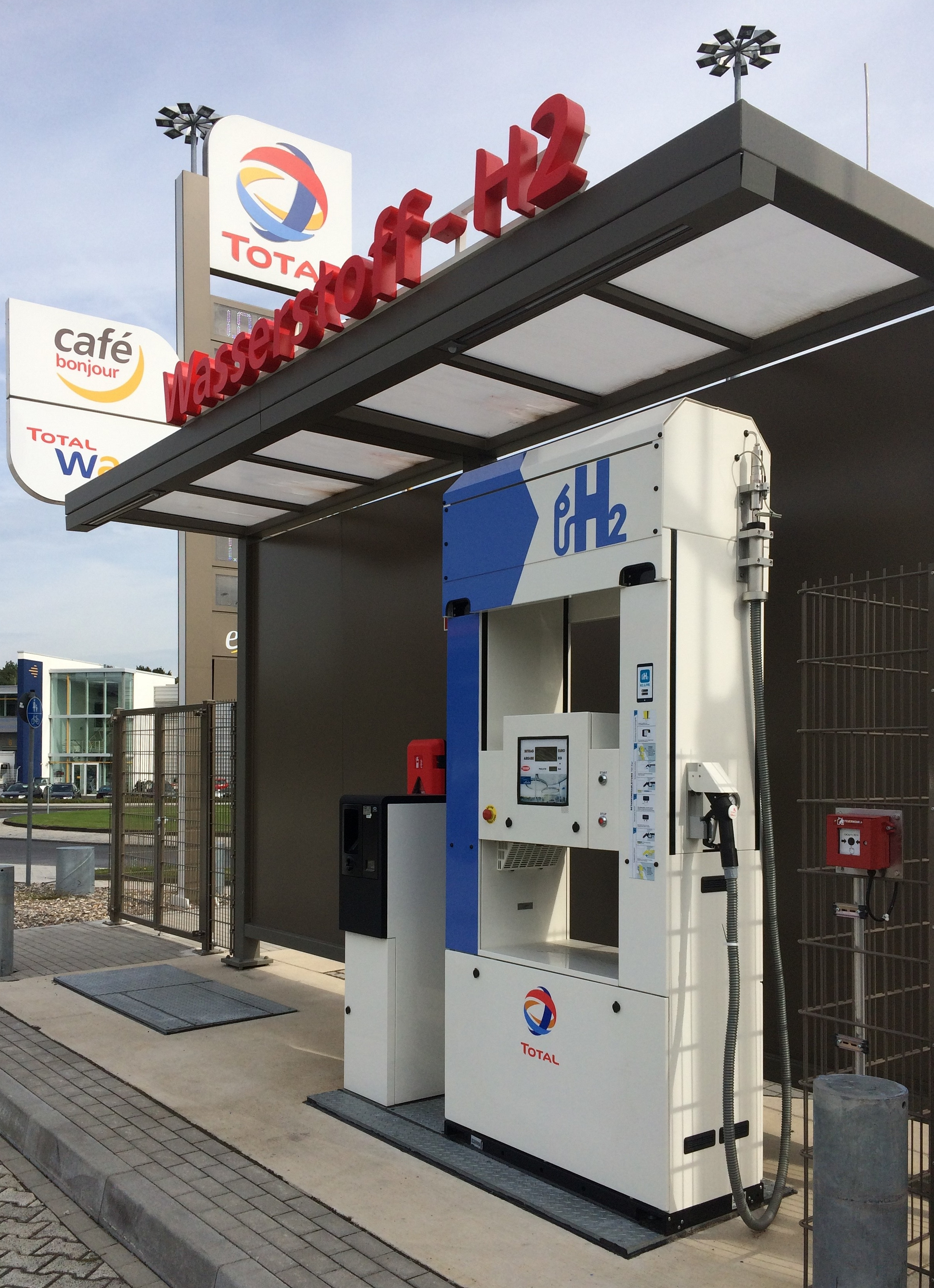 Wasserstoff-Station am Flughafen Köln-Bonn